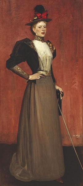 Maggie Hamilton